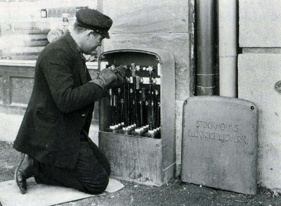 Arbete i kabelskåp med säkringar för lågspänningskablar